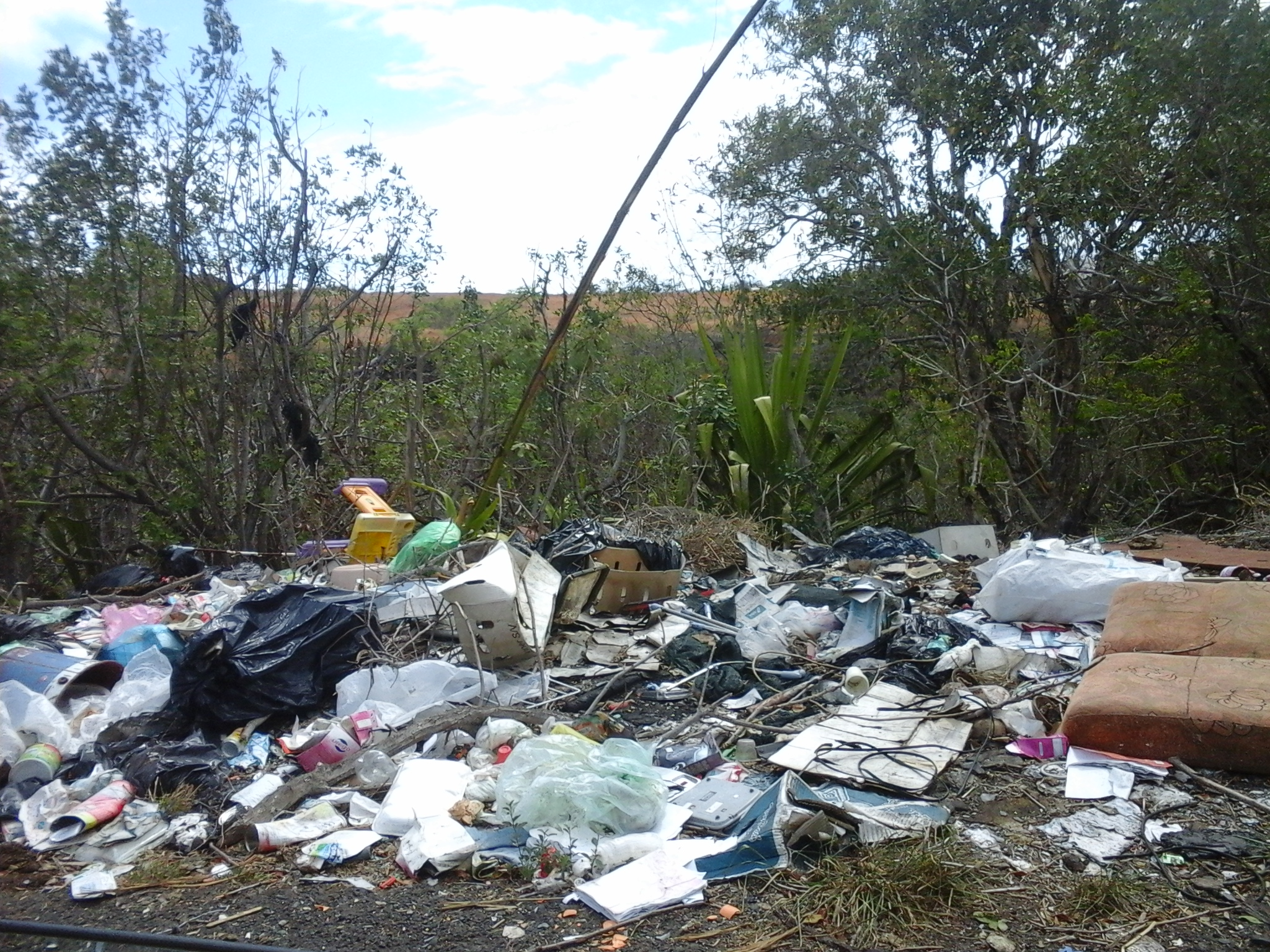 Problème de déchets sur la route qui mène à ce lieu d'échanges et de rencontres.